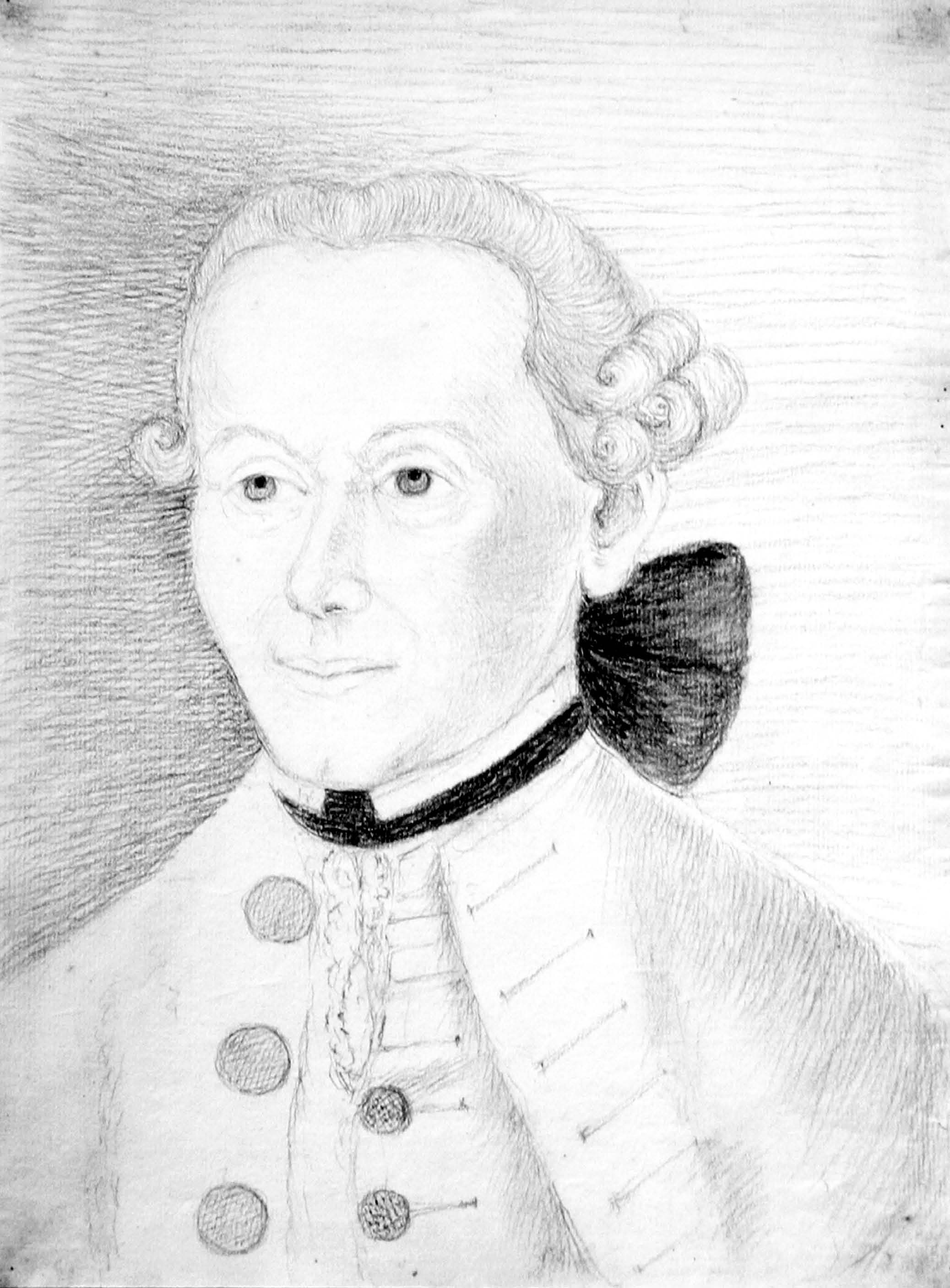 Der junge Kant